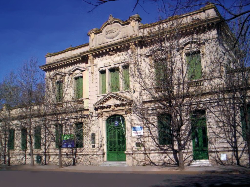 Escuela Nº 1 "Catalina Larralt de Estrugamou", en Junín, provincia de Buenos Aires, Argentina. Aquí terminó su educación primaria Eva Perón en 1934, a los 15 años.